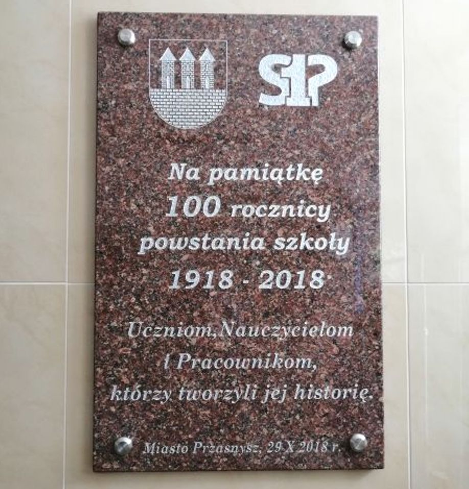 Przasnysz. 100 rocznica powstania SP 1